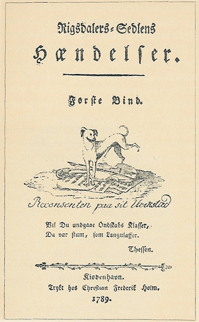 Titelblad til første bind af Peter Andreas Heibergs "Rigsdalers-Sedlens Hændelser" fra 1789.